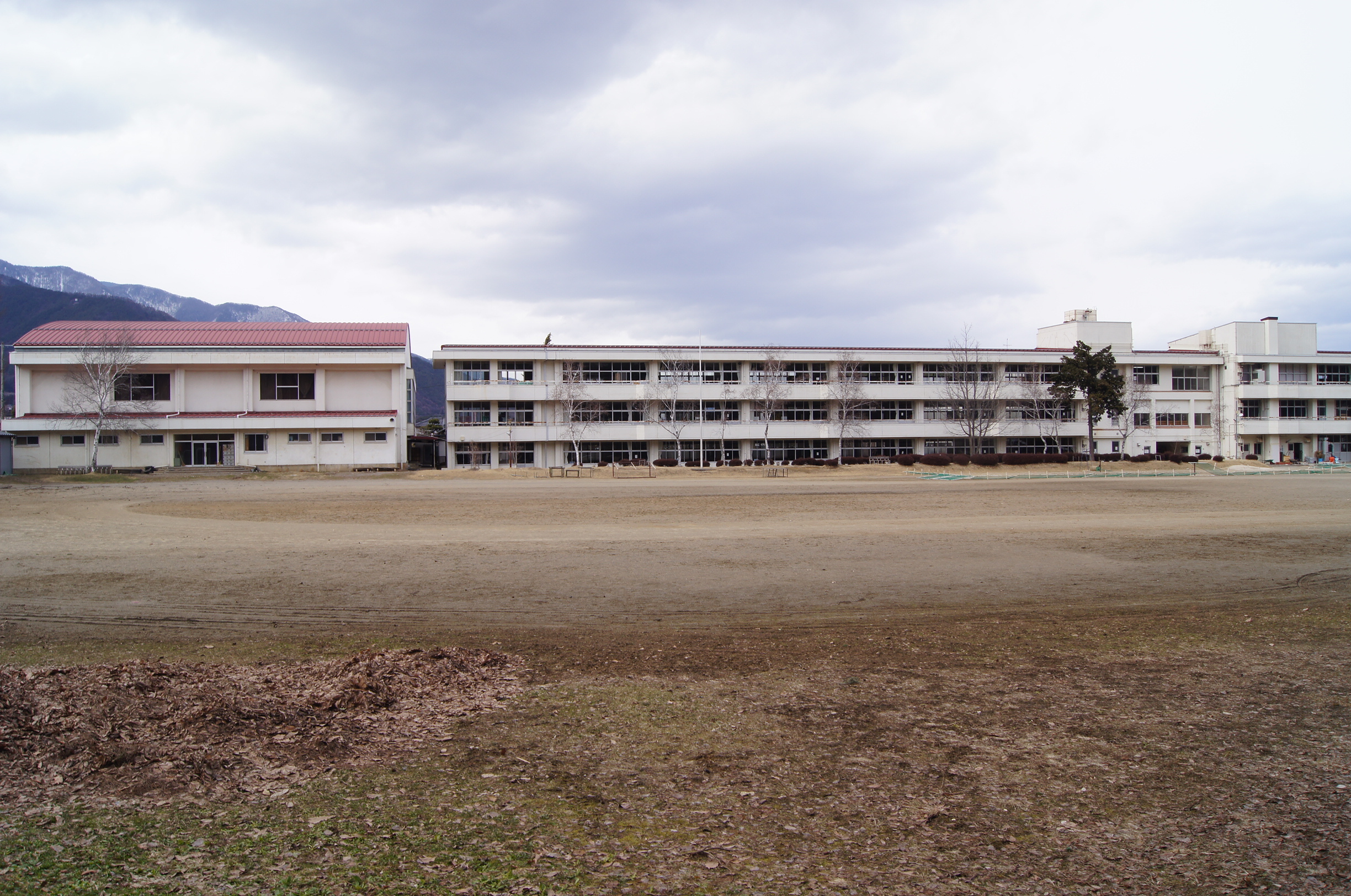 長野県松本市波田にある松本市立波田中学校を、裏（南）側から、校庭を通して撮影した画像。